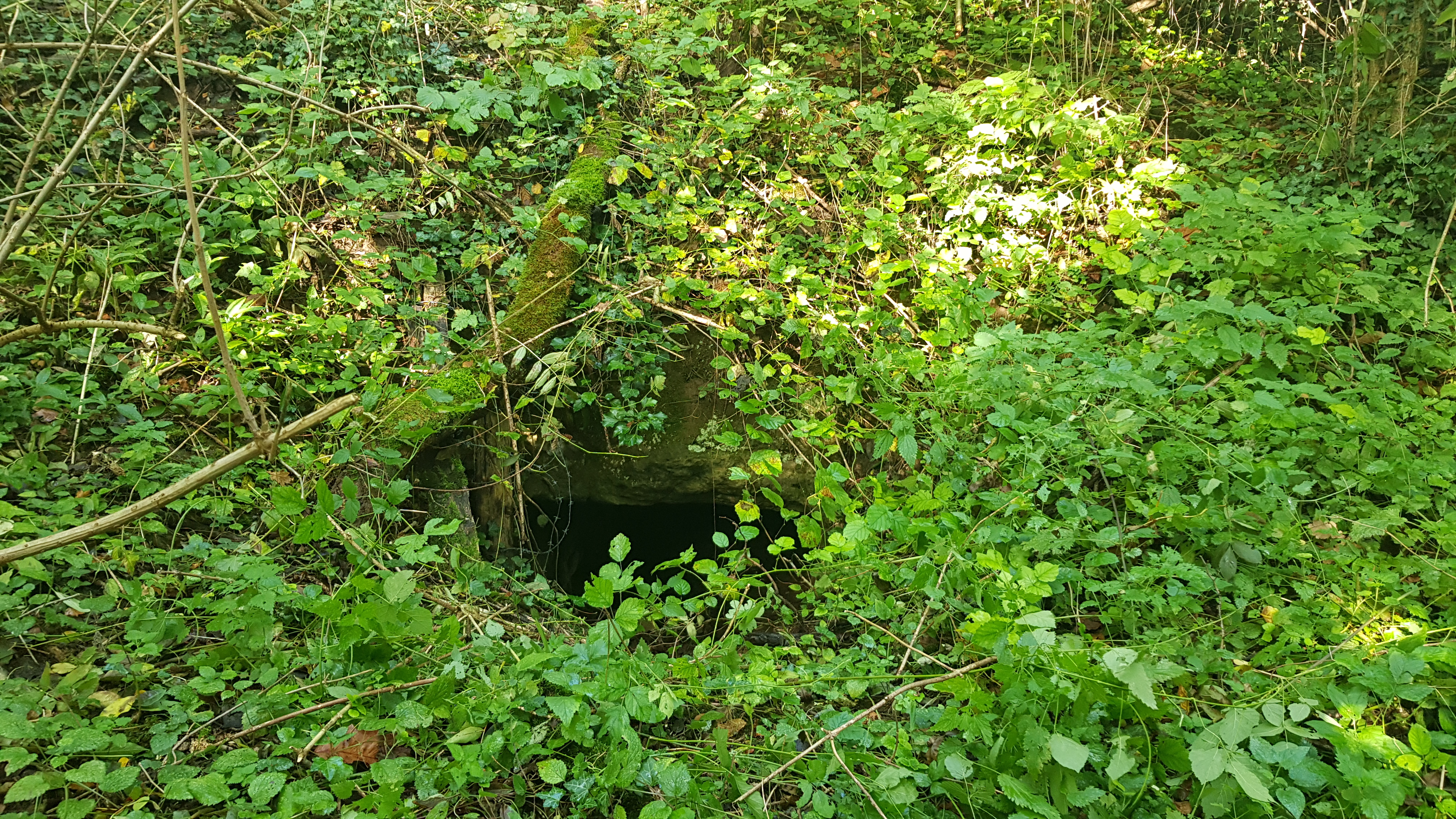 Beckersbergske, Valkenburg, Nederland